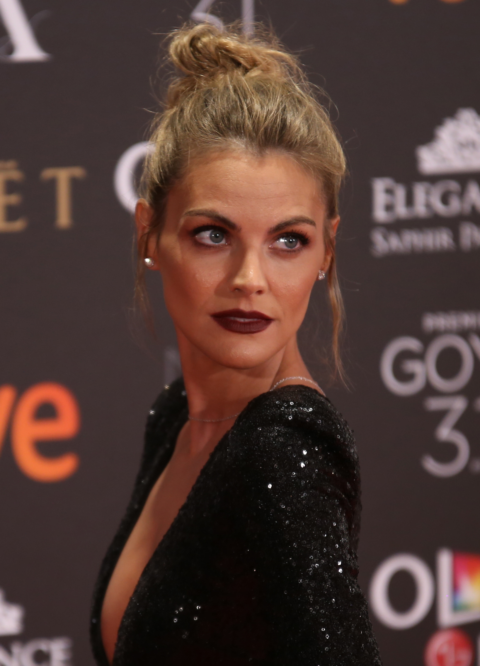 Premios Goya 2017